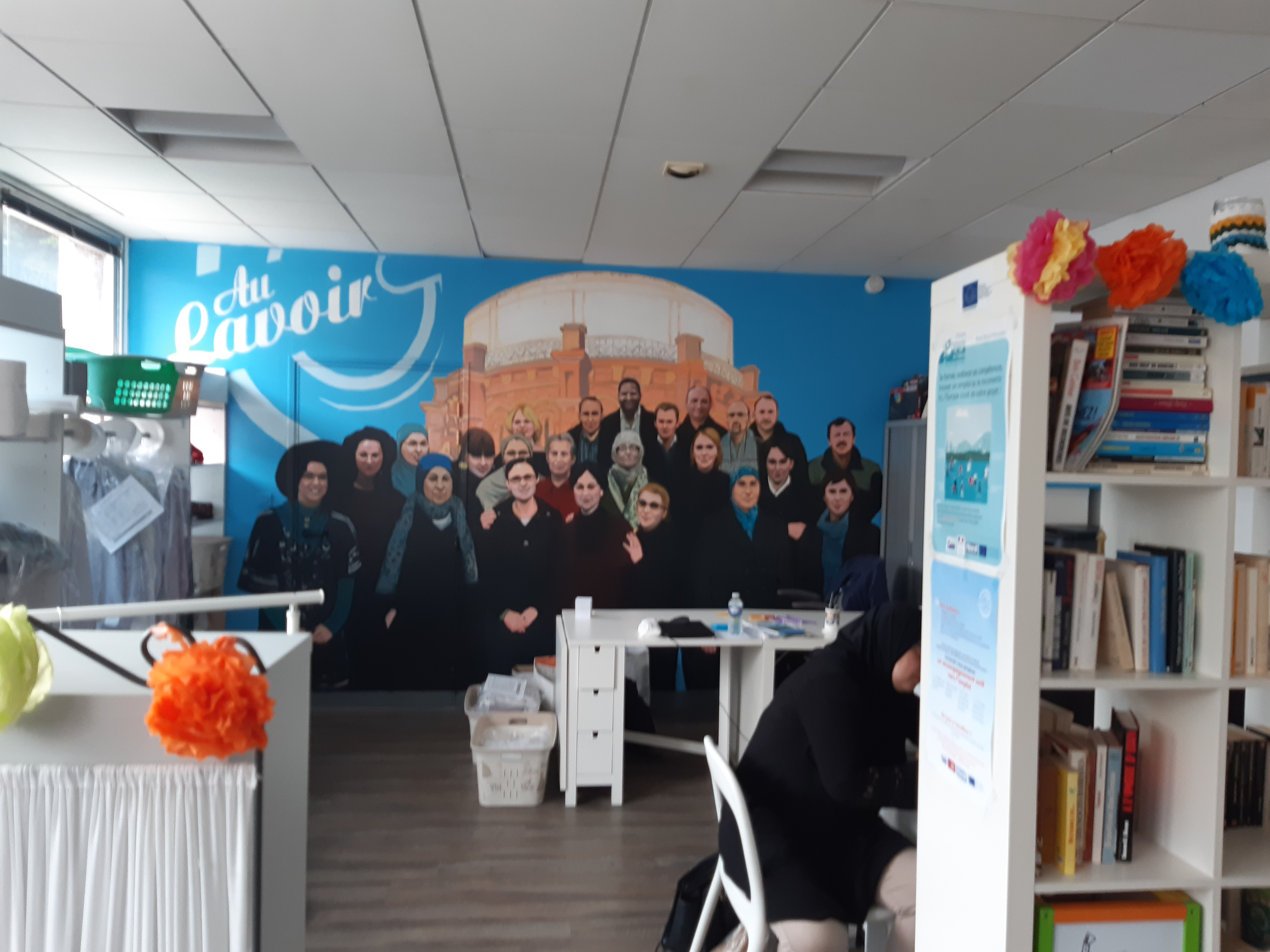 Faubourg de Bethune. Accompagnement insertion professionnelle